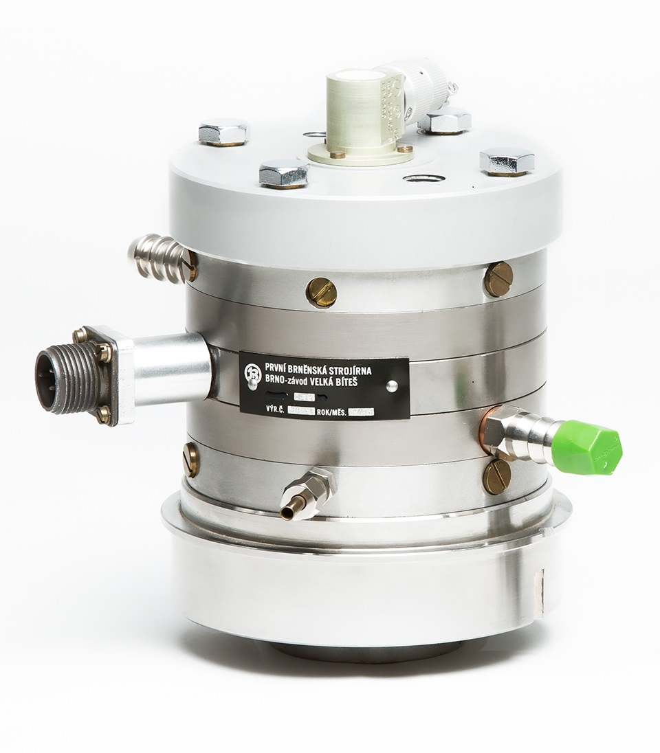 Héliová expanzivní turbína